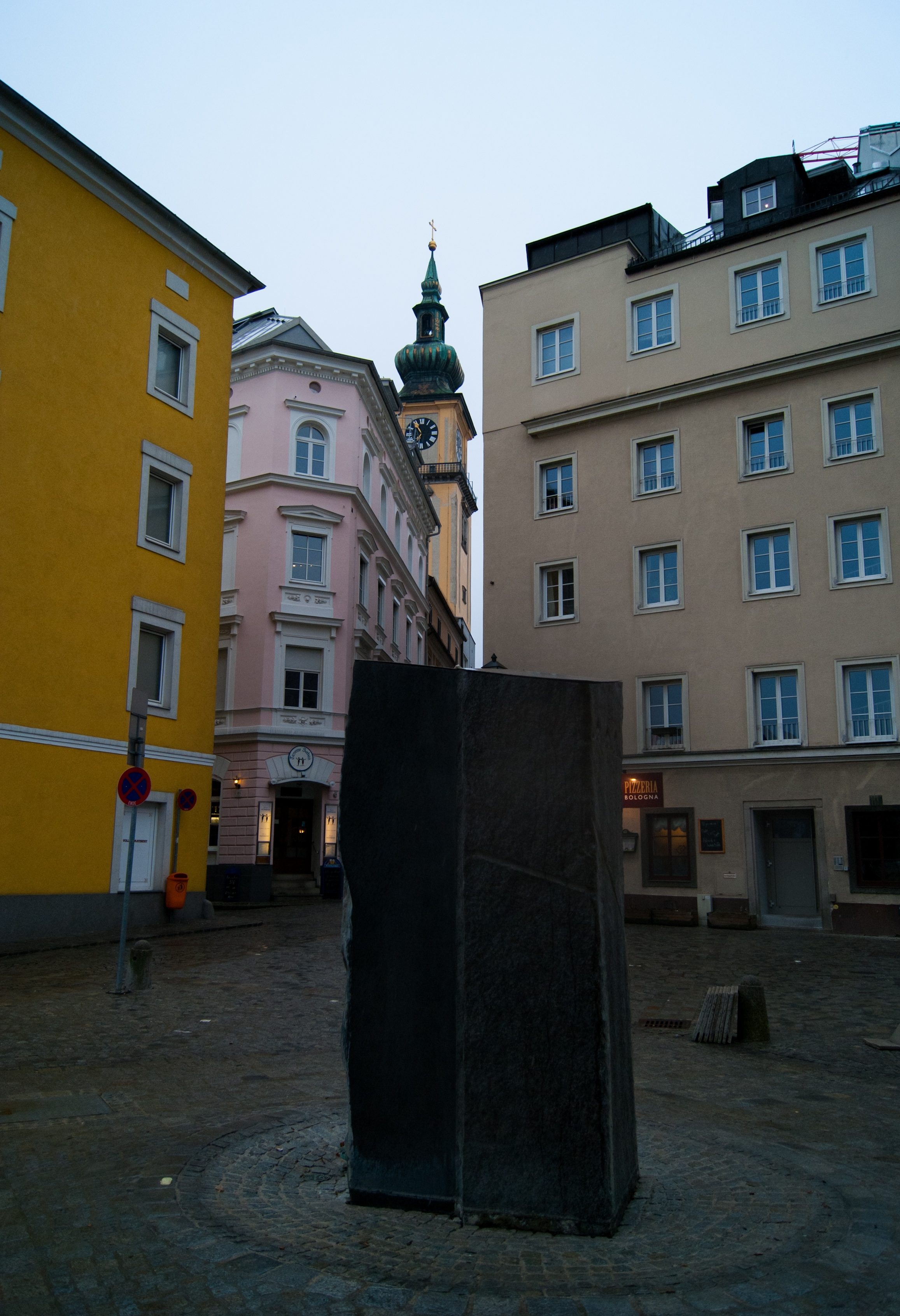 Linz, Jubiläumsbrunnen Adalbert-Stifter-Platz.